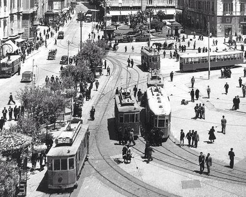 Napoli, Piazza Dante. Snodo di tram. Autore sconosciuto.